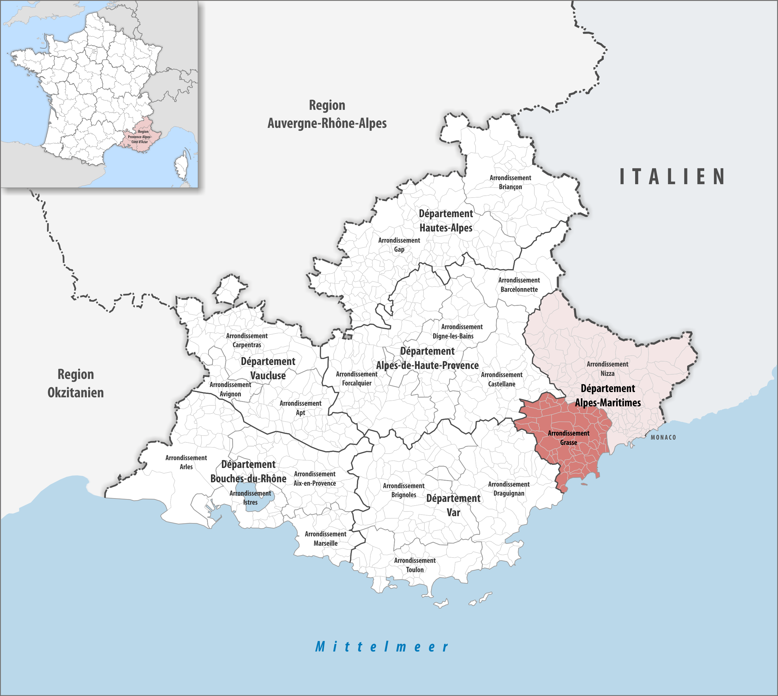 Lage des Arrondissements Grasse